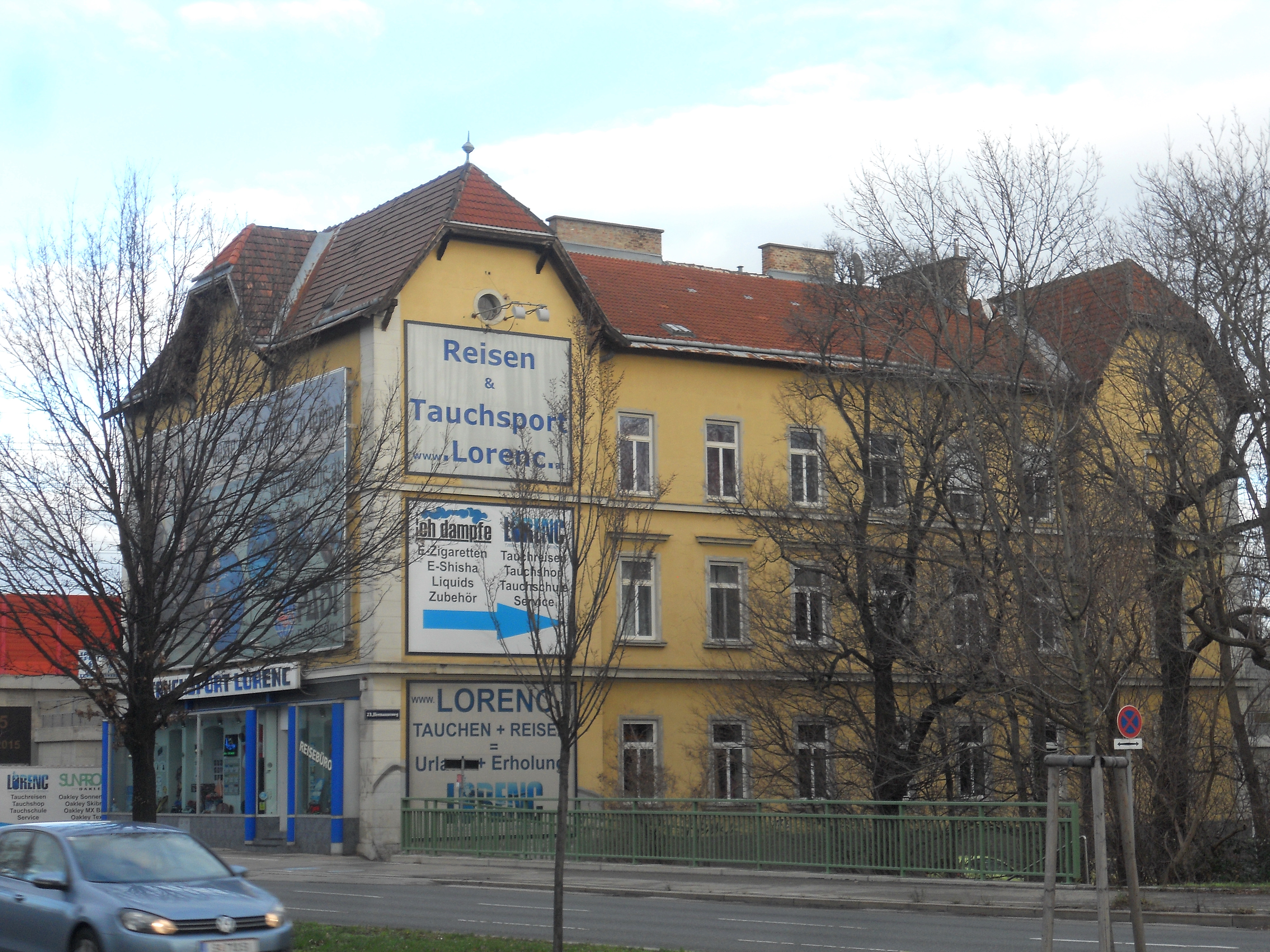 Linienamt Inzersdorf, Triester Straße 167